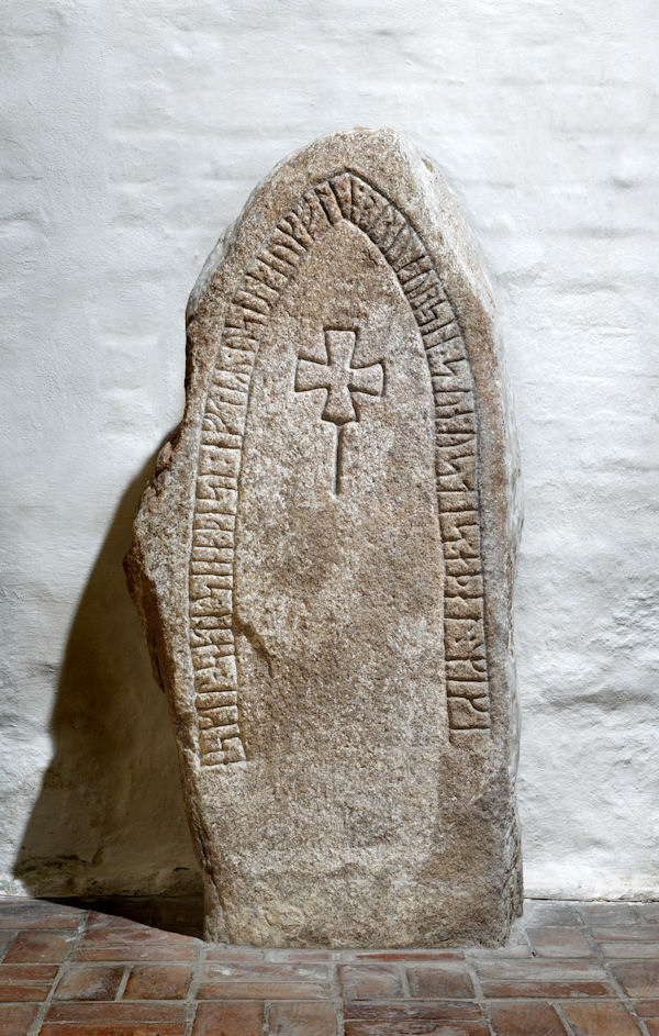 Foto af Roberto Fortuna